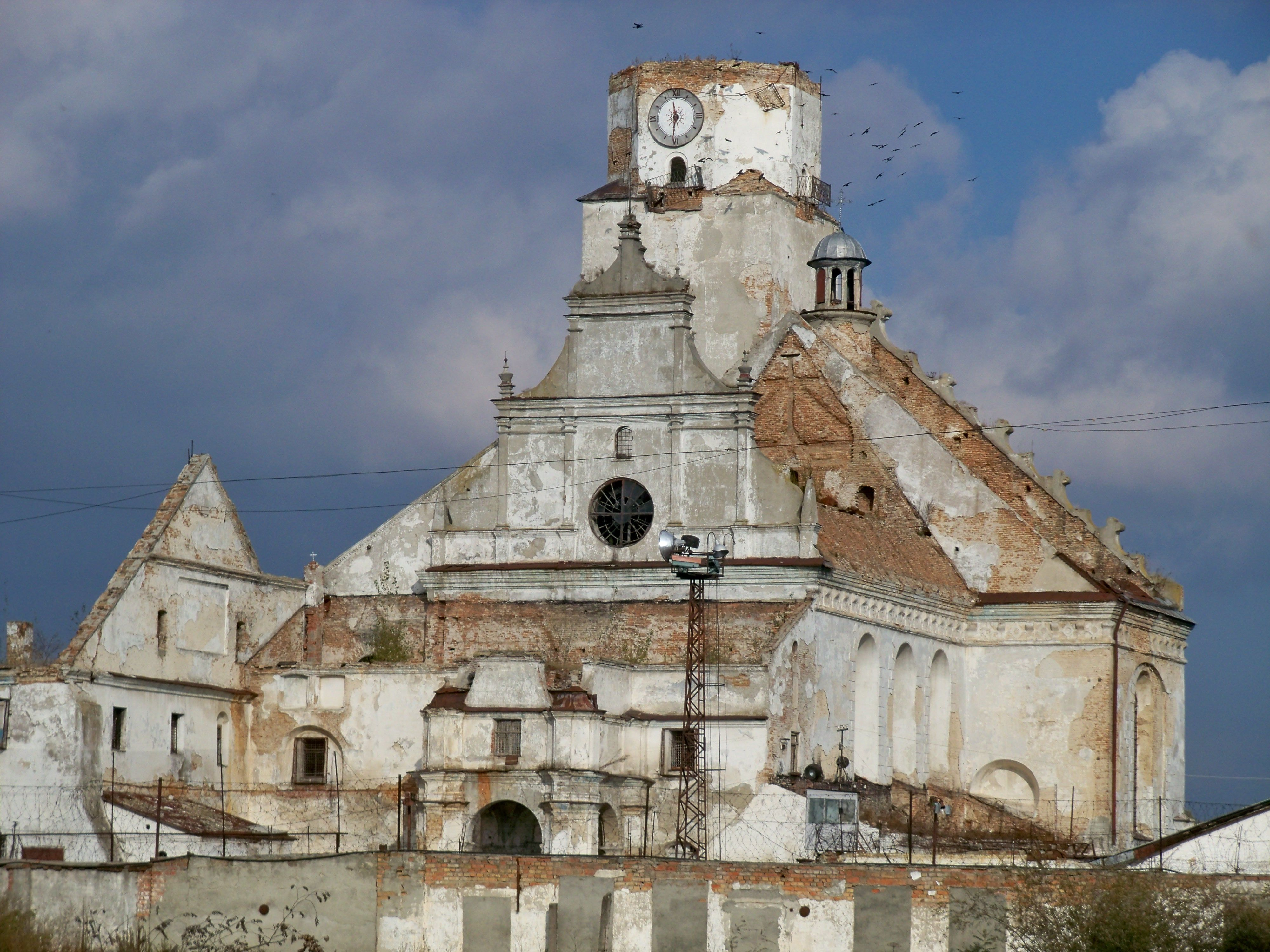 Костел Пресвятої Богородиці (мур.), Сокаль, вул.Набережна